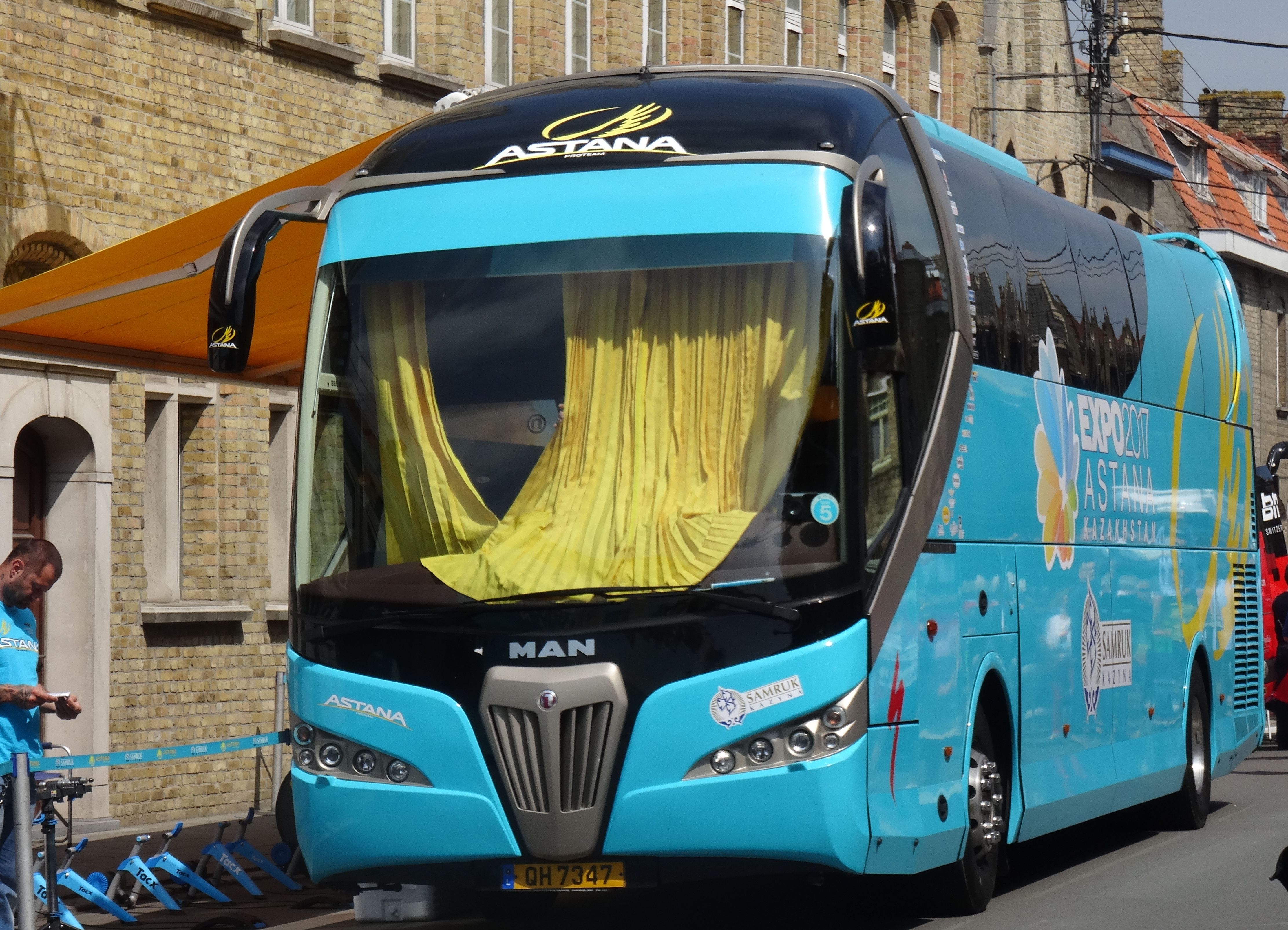 Reportage photographique réalisé le vendredi 30 mai à l'occasion du contre-la-montre individuel de la troisième étape du Tour de Belgique 2014 à Dixmude, Belgique.